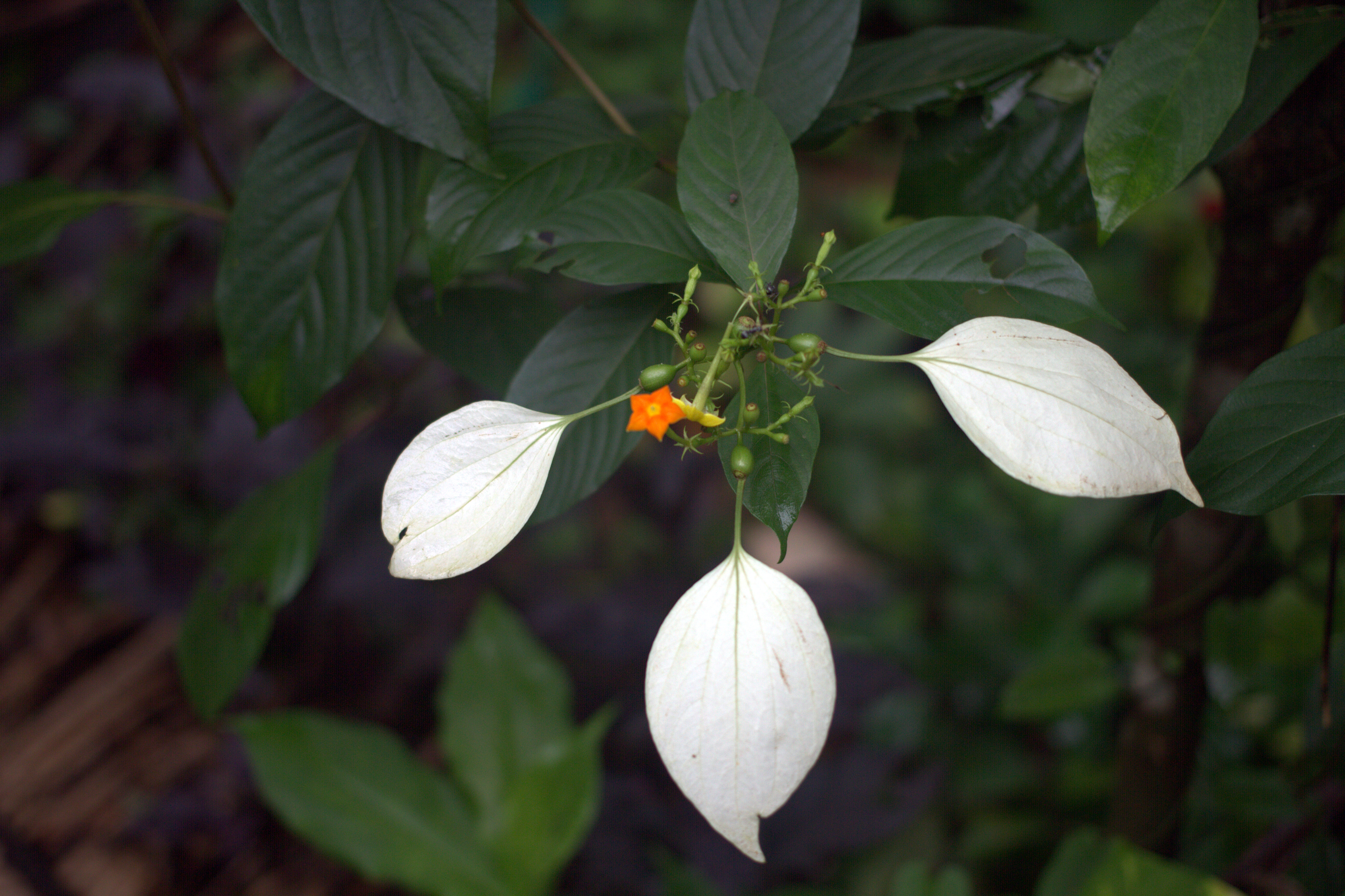 വെള്ളില